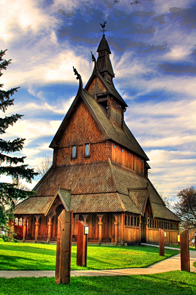 Hopperstad stave church replica på Heritage hjemkomst center i Moorehad, Minnesota, USA